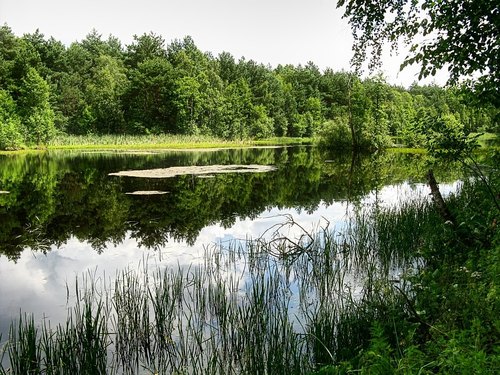 Teren przyległy do Rezerwatu